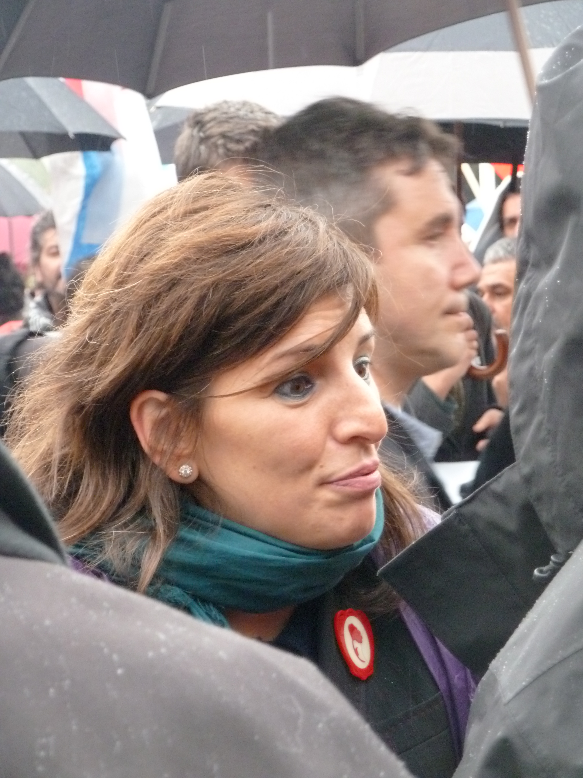 Yolanda Díaz na manifestación de Nunca Máis no xuízo do Prestige.